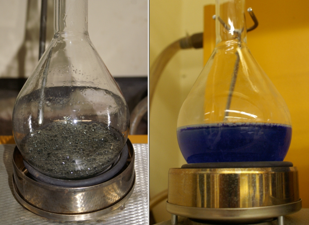 Bestimmung von Gesamtstickstoff in Gülle, Kjeldahl-Aufschluß und Destillation